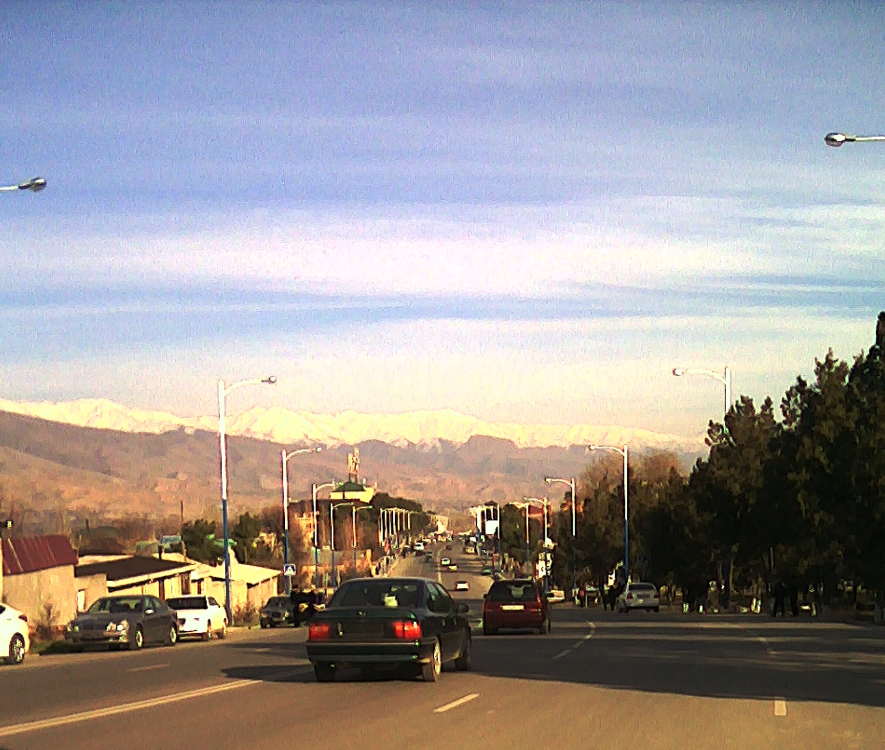 Главная улица в г Панджакенте, Таджикистан